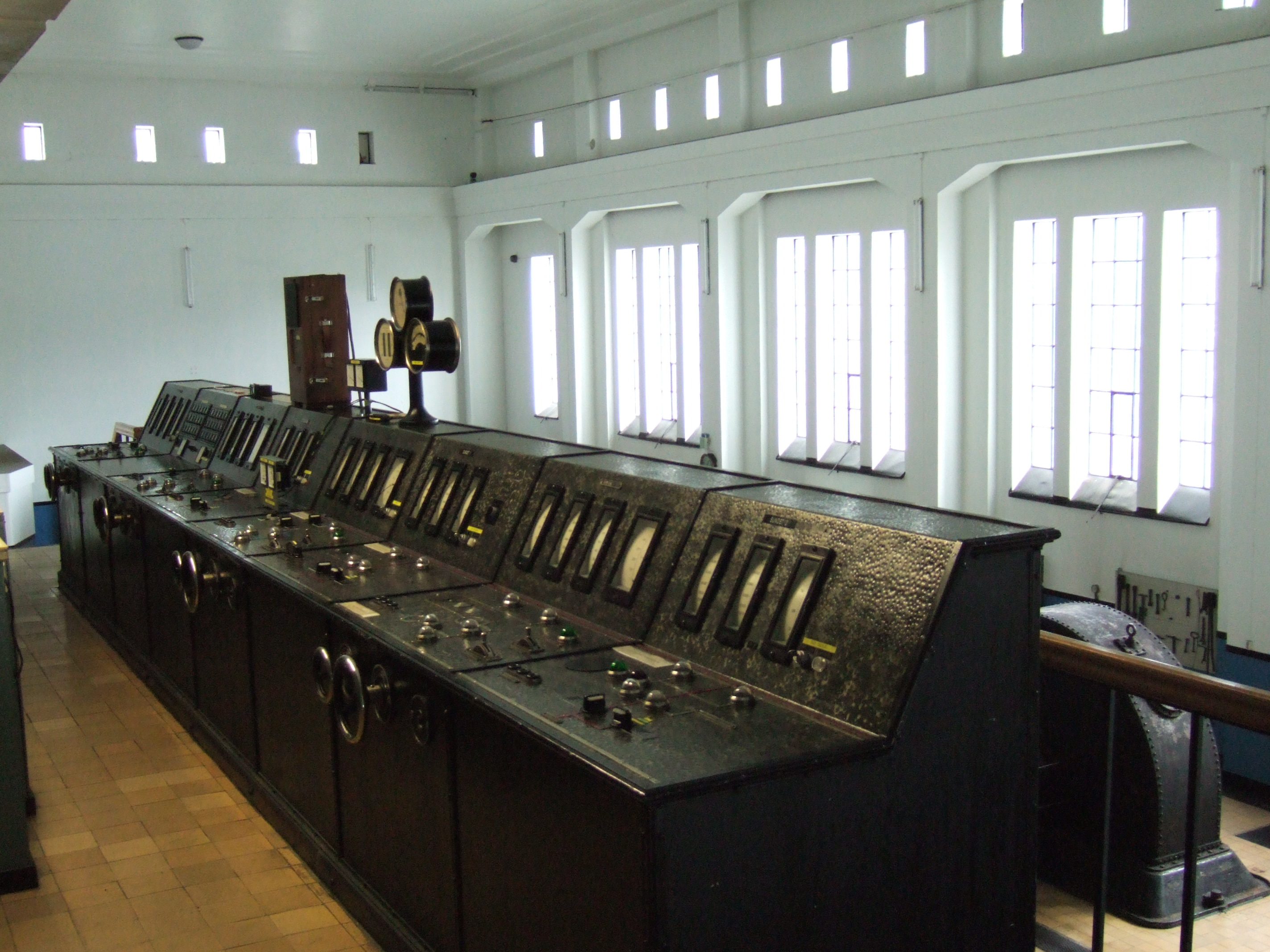 Instruments in the control room for Hakavik Power Station, Øvre Eiker.